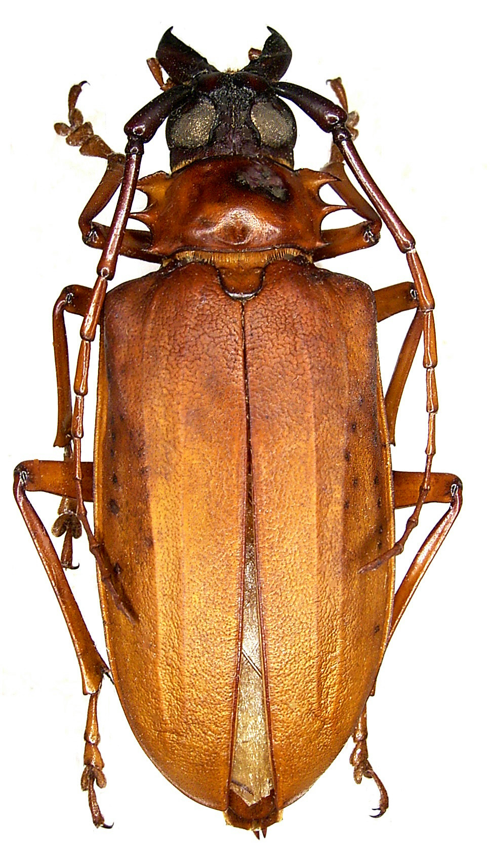 Familie: Cerambycidae Grösse: 45 mm Fundort: Vietnam, Yen Bai Prov., An Fu Country leg. 1996; det. A.Weigel Foto: U.Schmidt, 2007